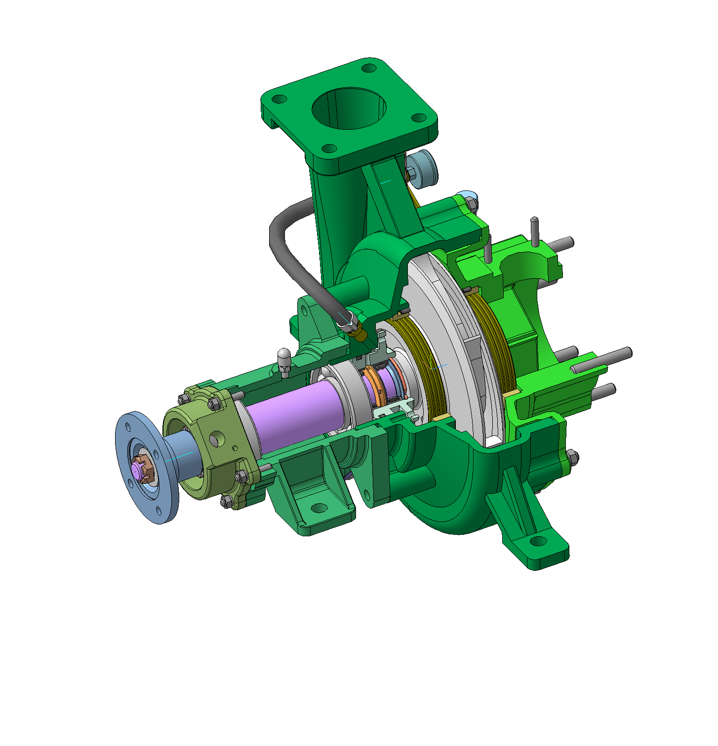 Разрез насоса пожарного 40 л/с